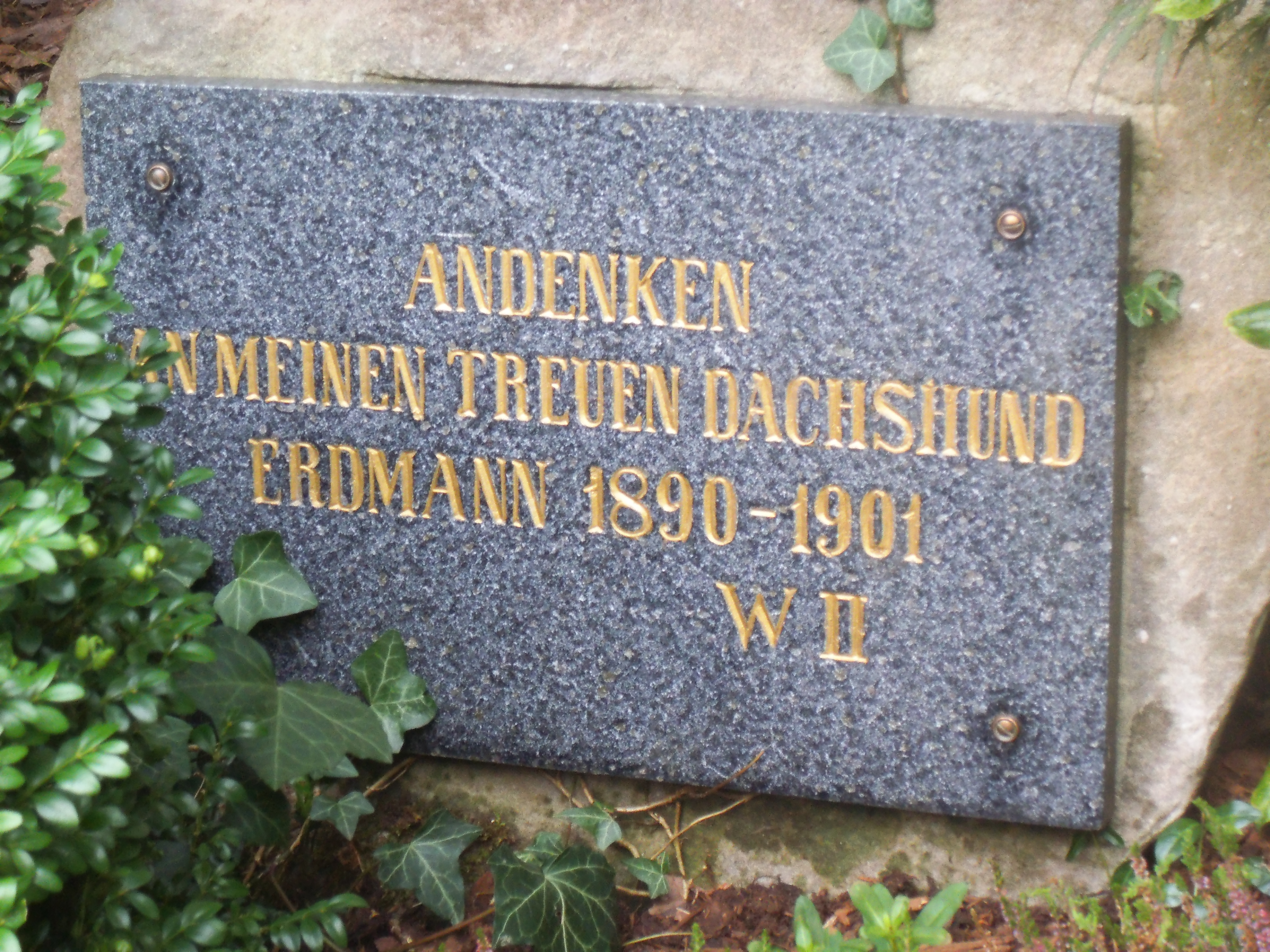 Der Grabstein für den Dackel Erdmann. Erdmann war der Kurzhaardackel von Kaiser Wilhelm II. Das Grab befindet sich bei der Roseninsel im Bergpark Wilhelmshöhe in Kassel.